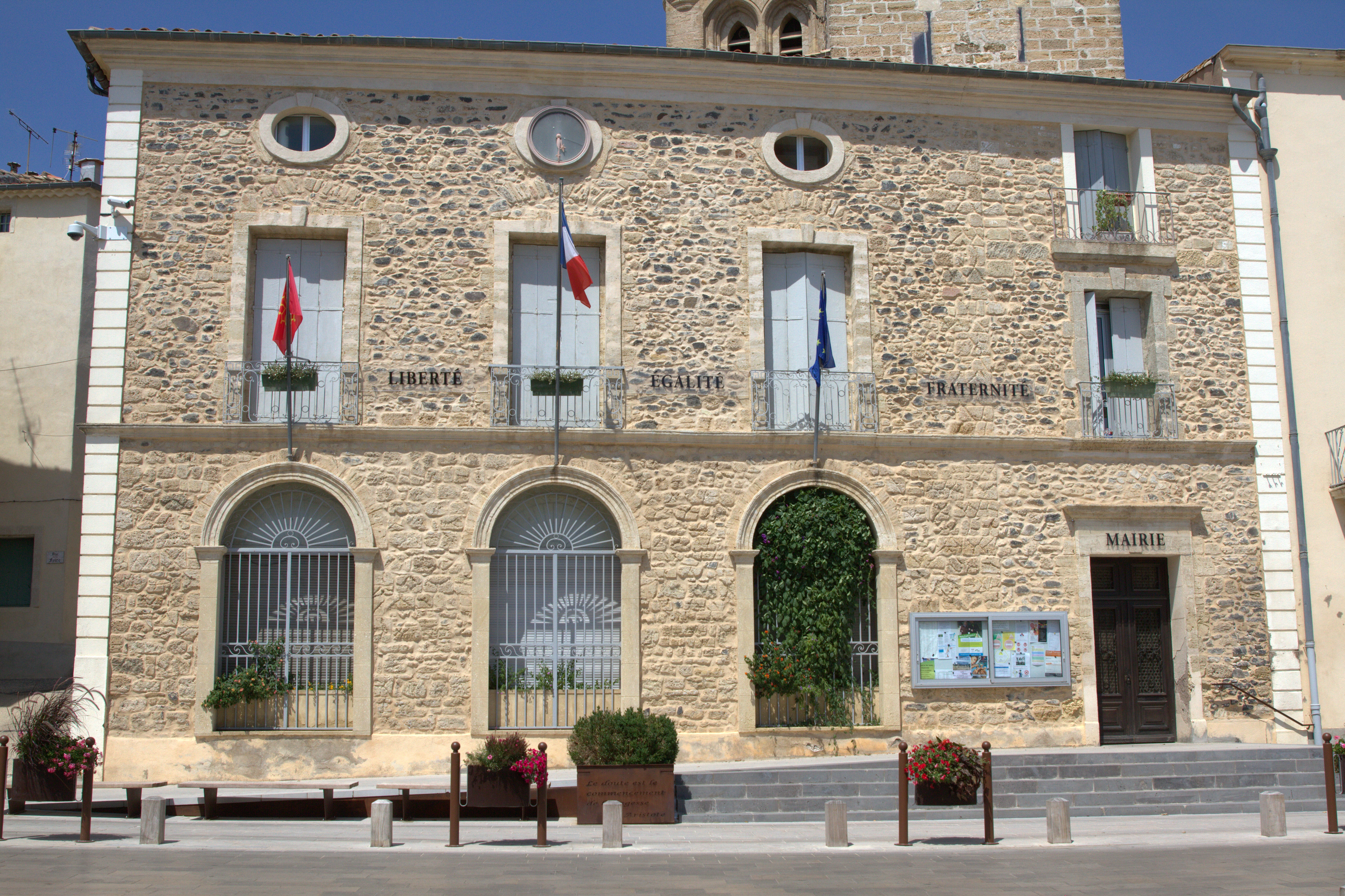 Mairie de Caux.